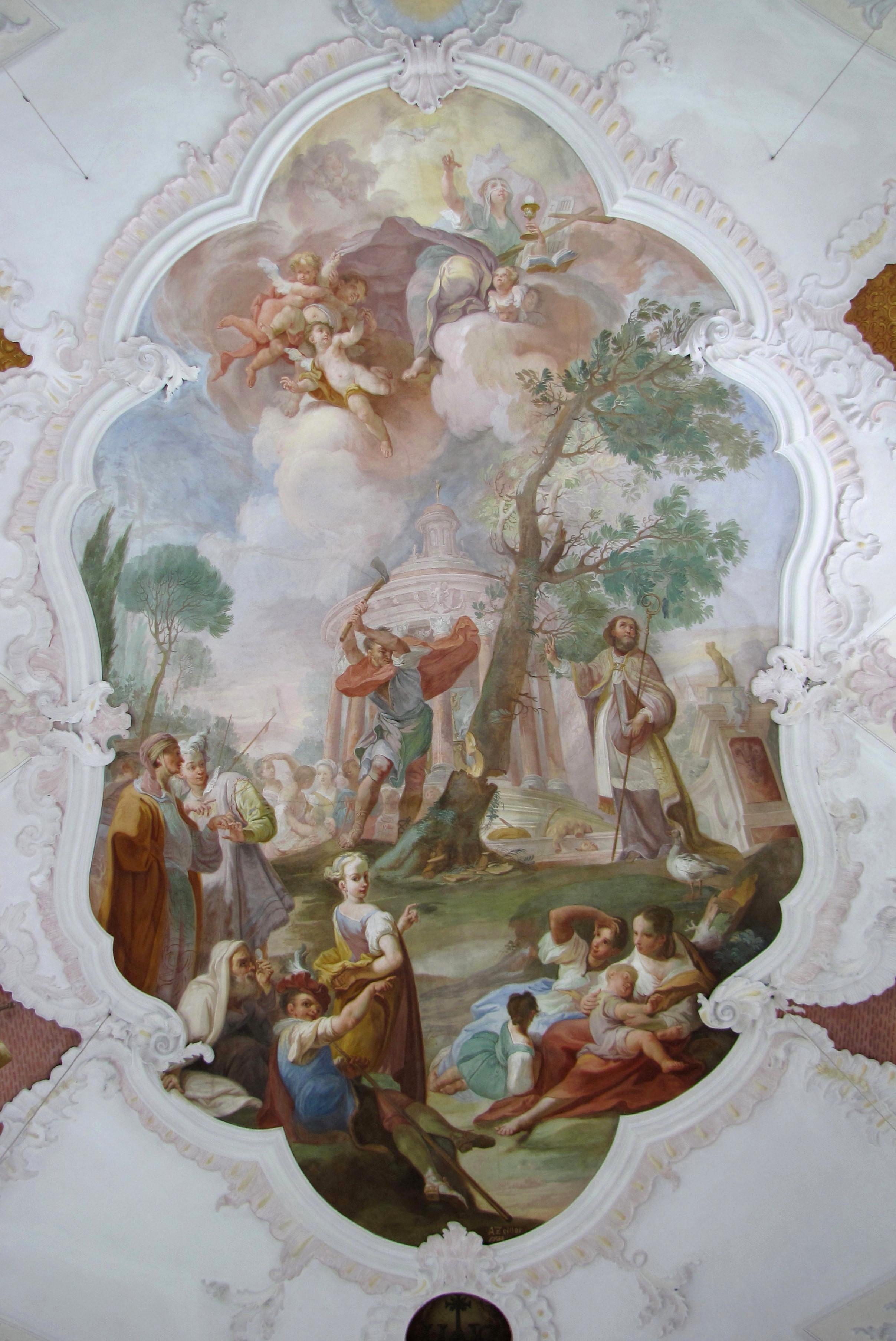 Deckenfresko von Franz Anton Zeiller in der Kirche von Sachsenried, 1753